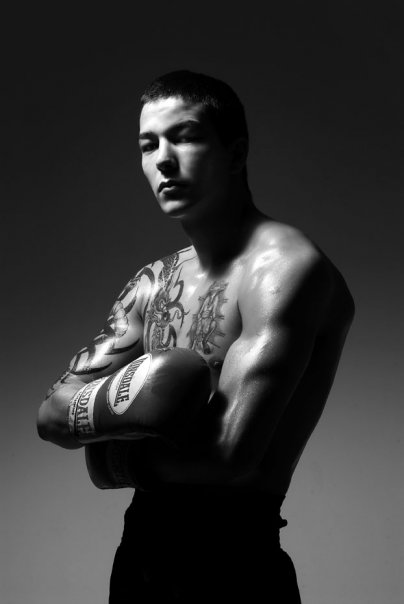 Nikola Stevanovic, srpski bokser